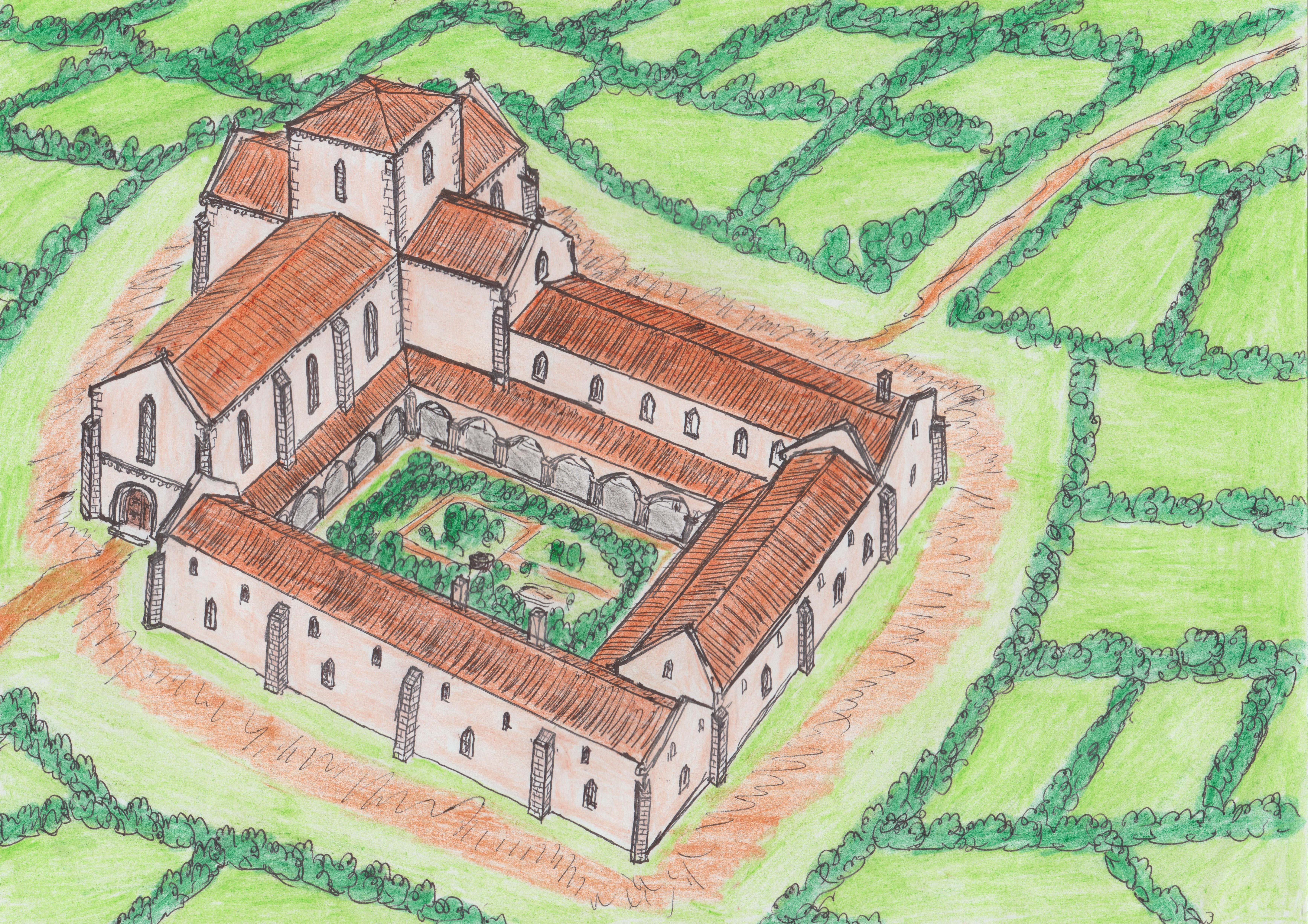 Dessin en couleurs montrant une vue hypothétique de l'abbaye des Fontenelles, près de la Roche sur Yon, après son achèvement au Moyen Age.